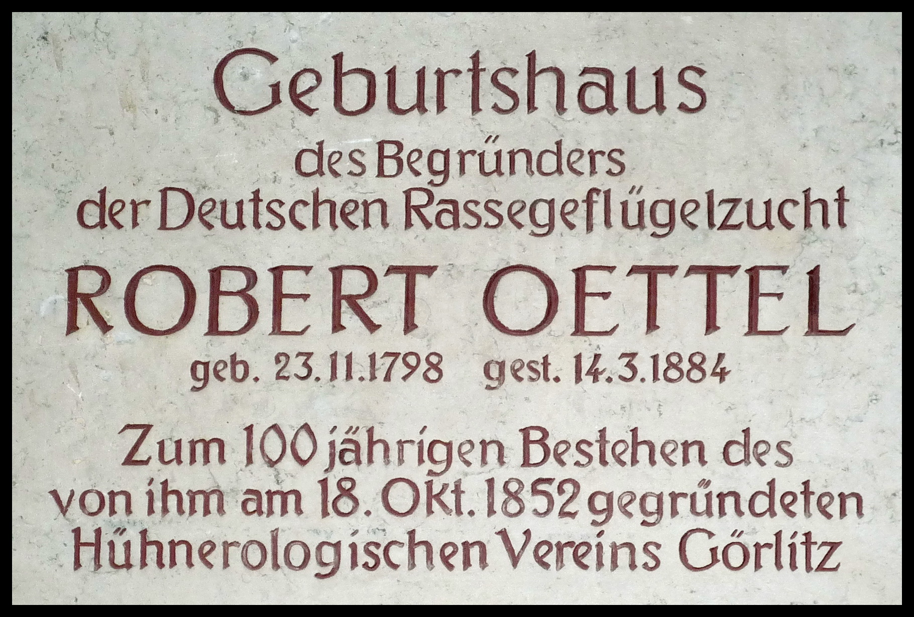 Gedenktafel am Geburtshaus von Robert Oettel dem Begründer des 1. Hühnerologischen Vereins in Görlitz